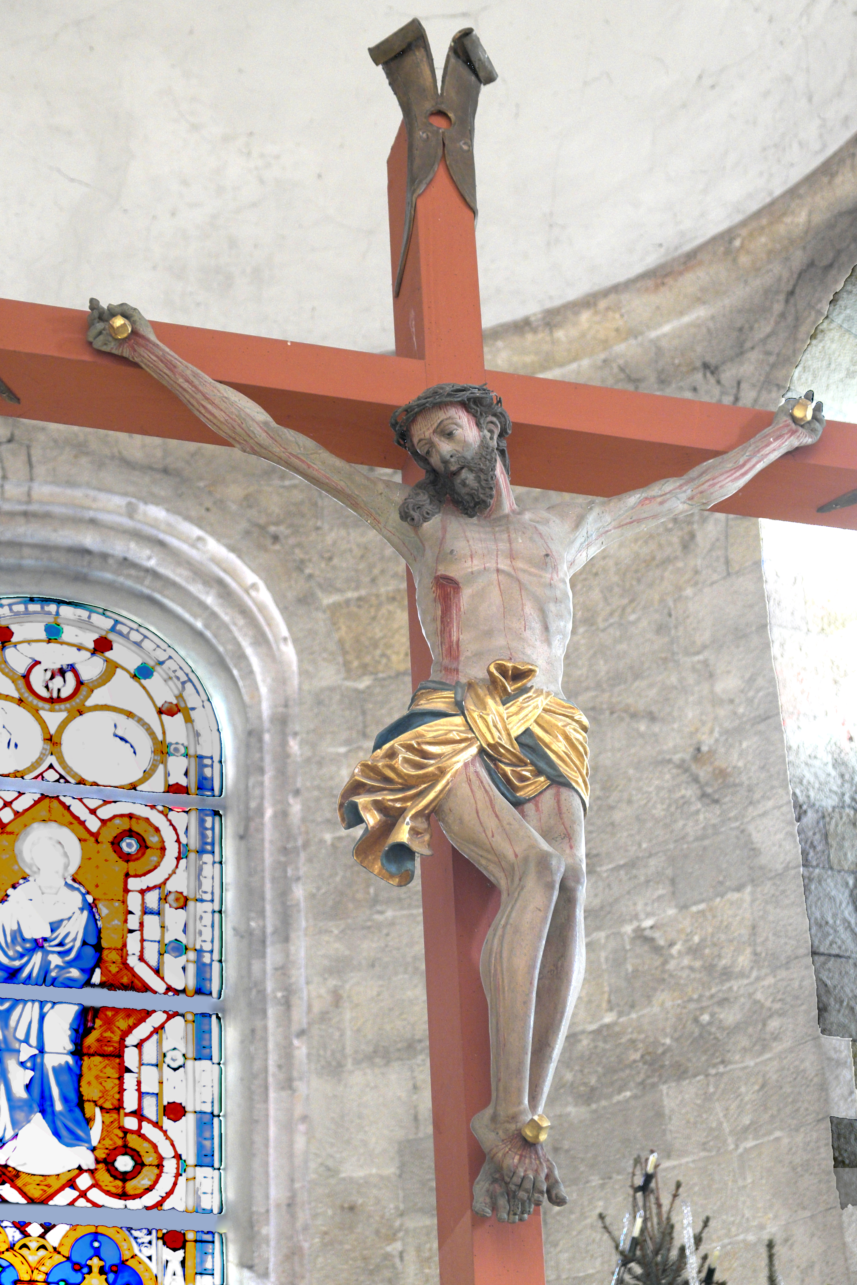 Katholische Pfarrkirche Maria Immaculata in Biburg im niederbayerischen Landkreis Kelheim (Bayern/Deutschland), Kruzifix